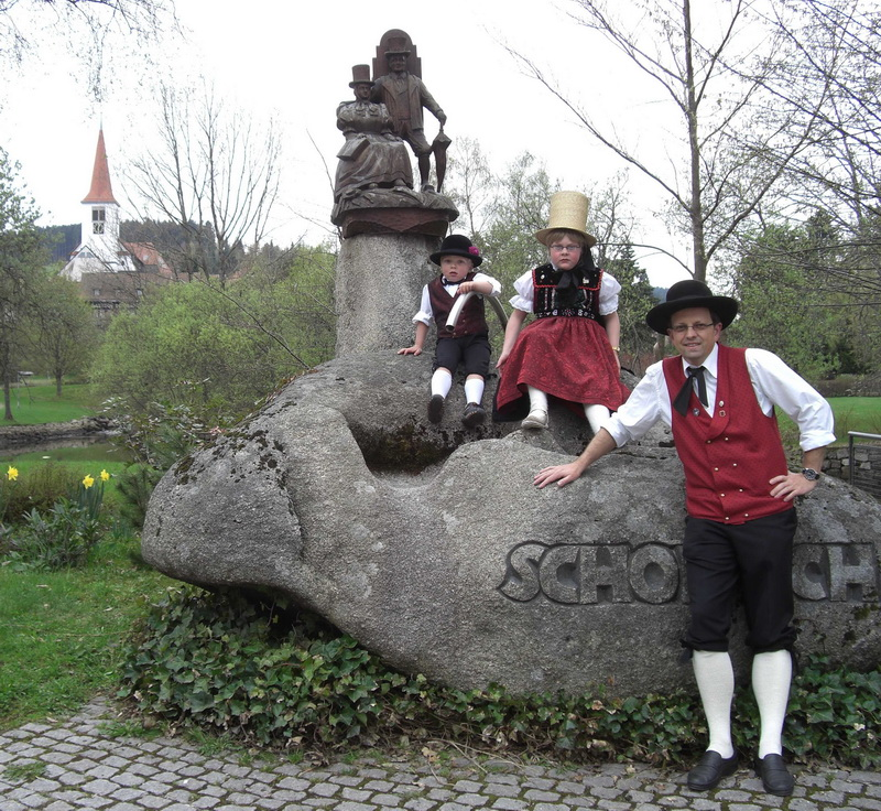 Schonacher Trachtenbrunnen mit Trachtenträgern; errichtet in dieser Form 2001